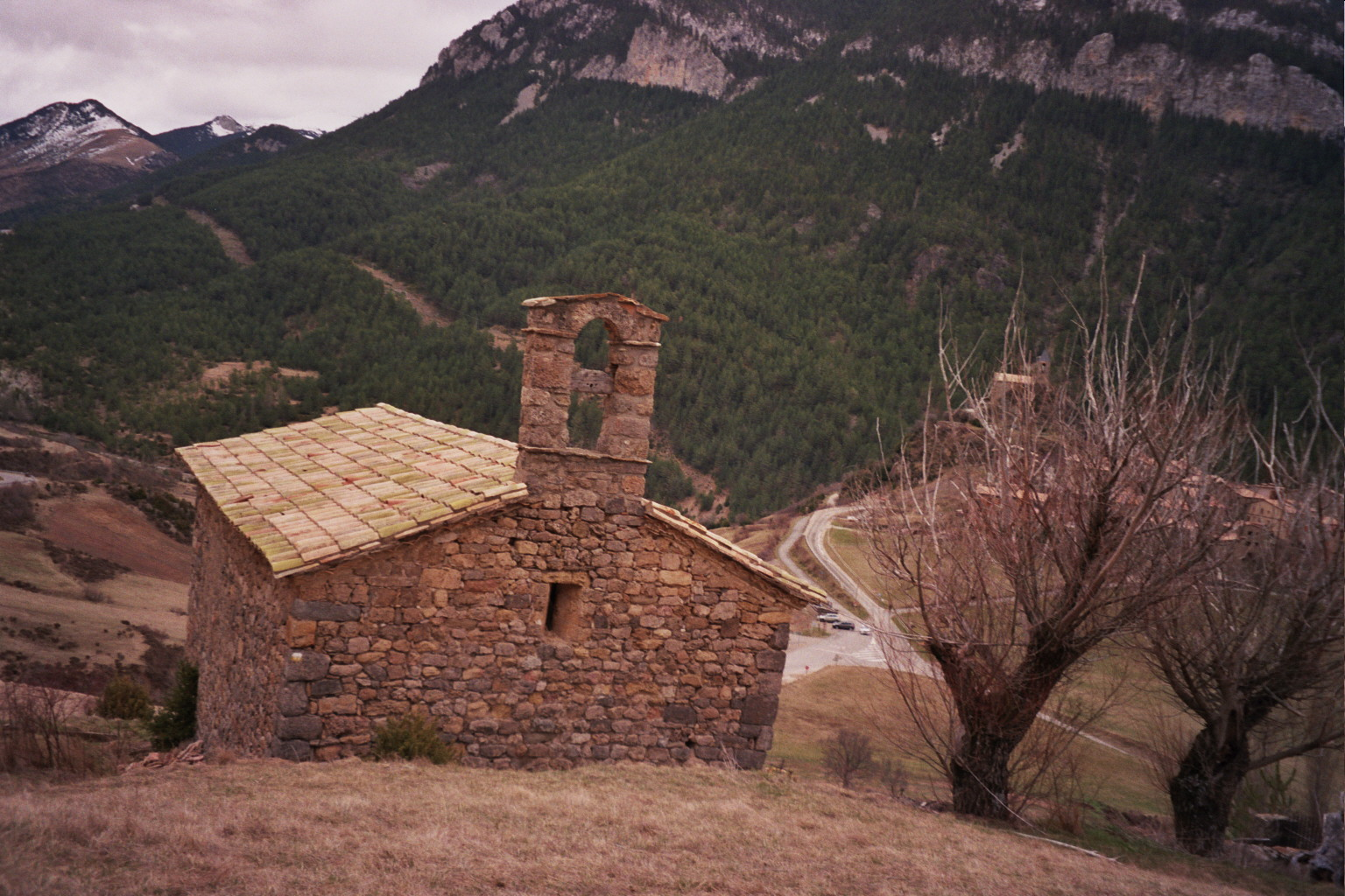 Després una molt forta pujada s'arriba a aquesta ermita de Santa Maria de Josa